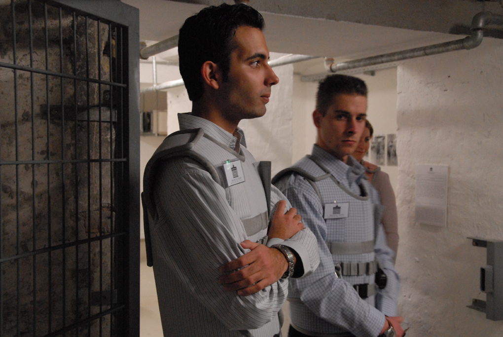 Wachdienstpersonal von EMBEDDED ART in Sicherheitswesten des südafrikanischen Künstlers Jacques Coetzer